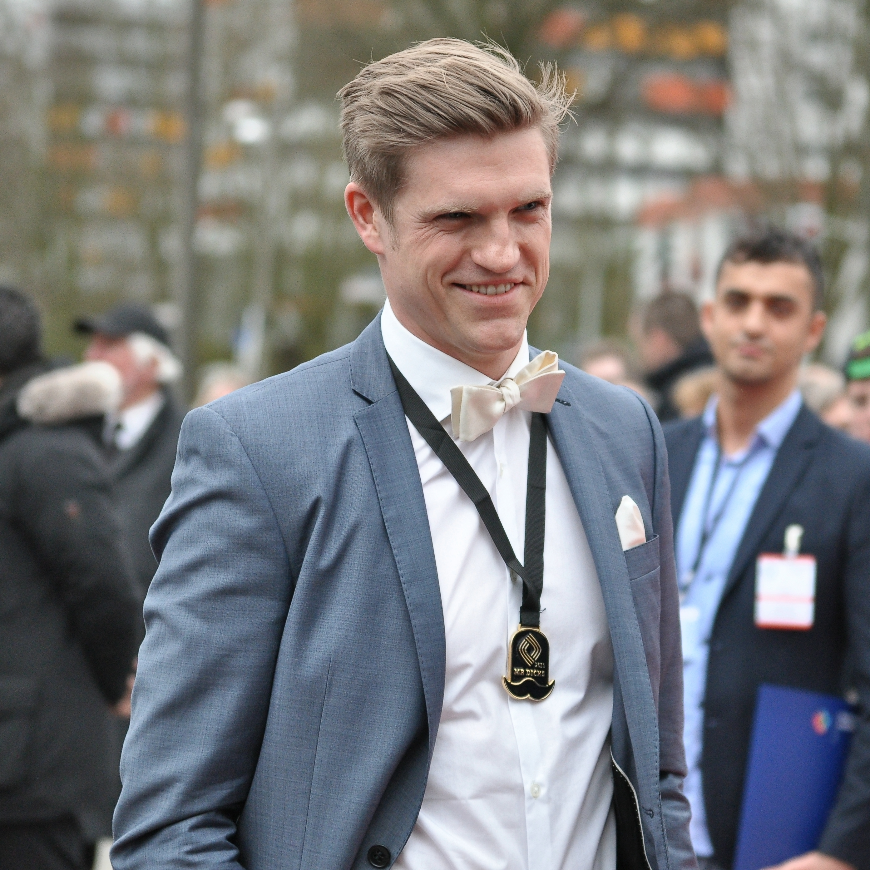 Verleihung des Grimme-Preises 2015.